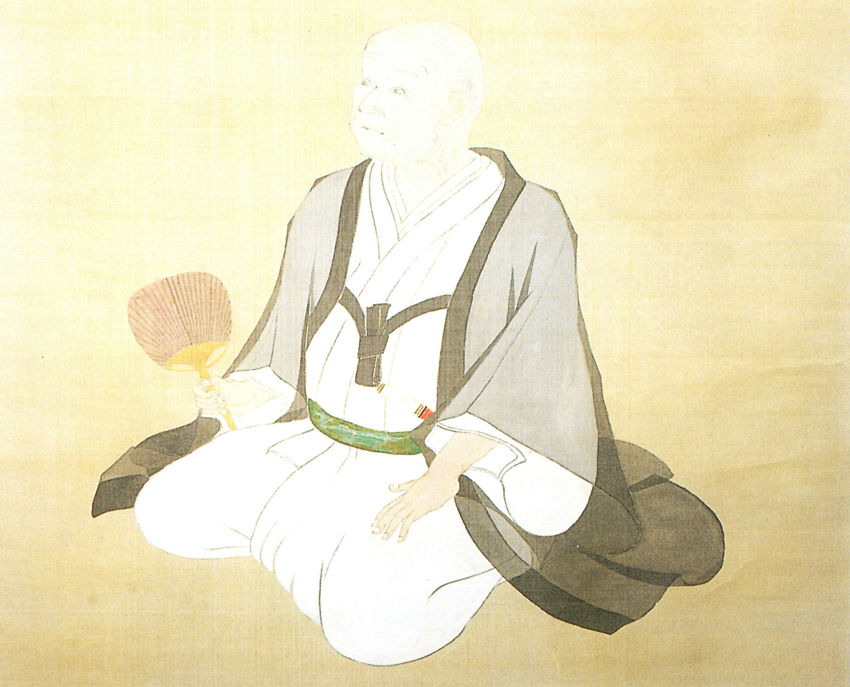 細川興文の肖像。